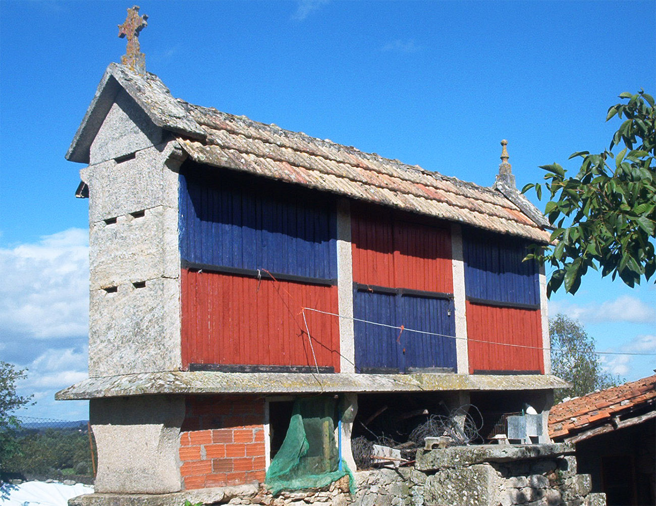 Hórreo de tres claros, sobre soleira e 4 cepas. Con cuberta de "tella inglesa" e promintentes "augas". Adornado con cruz a lampión coniforme. Presenta pintada a madeira dos laterais ao xeito arlequinado, moi común nos anos 60 en moitos hórreos da bisbarra. Ubícase no lugar do Pazo, na parroquia de Cervela (Antas de Ulla)